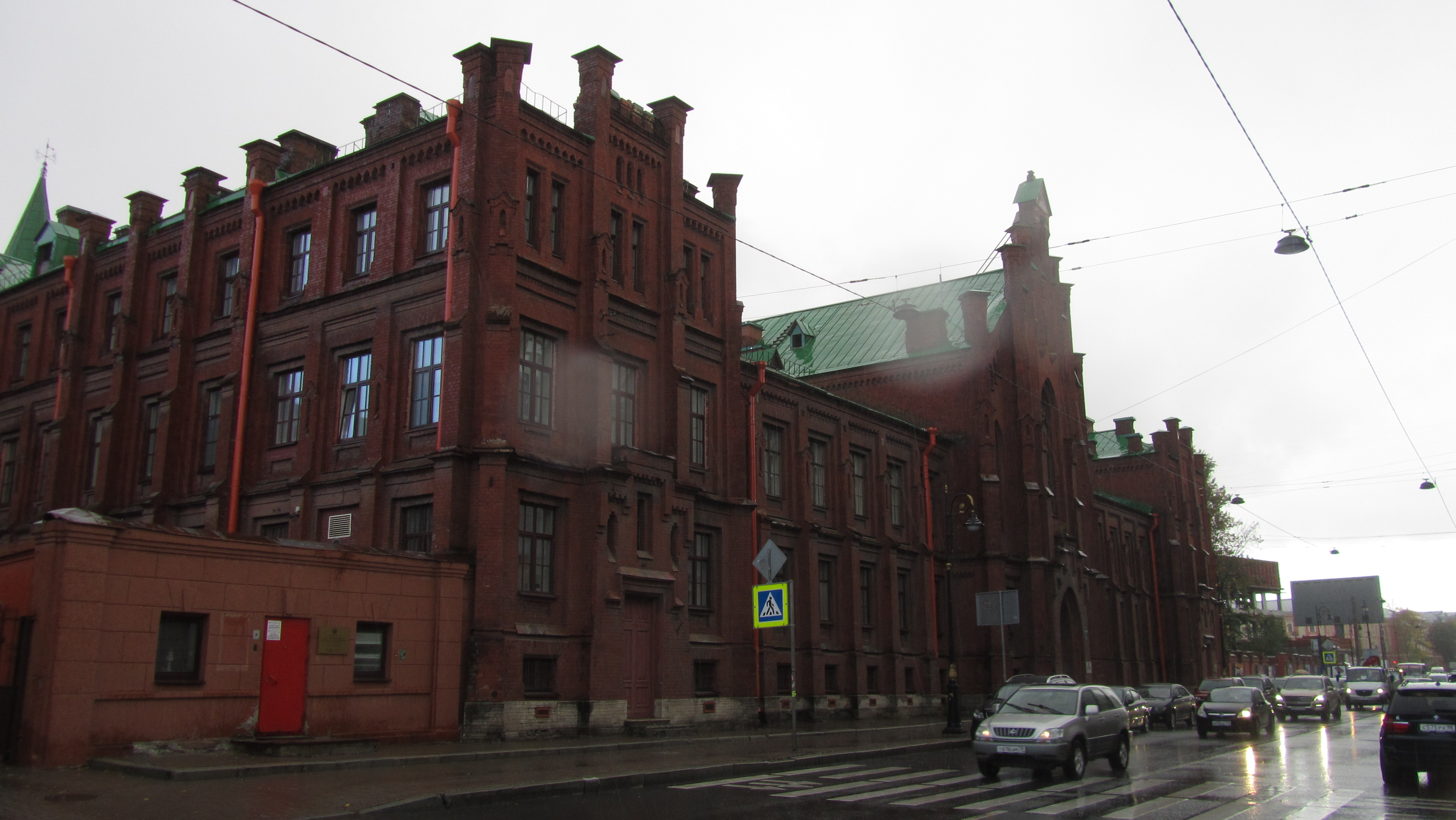 Евангелическая женская больница с евангелическо-лютеранской церковью (Санкт-Петербург и Лен.область, Санкт-Петербург, лиговский пр., 2-4, некрасова улица, 45)